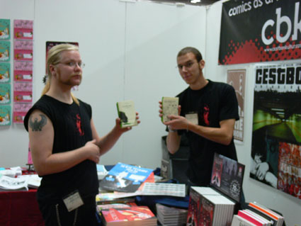 Oskar Aspman och Jamil Mani på Bokmässan i Göteborg 2006.